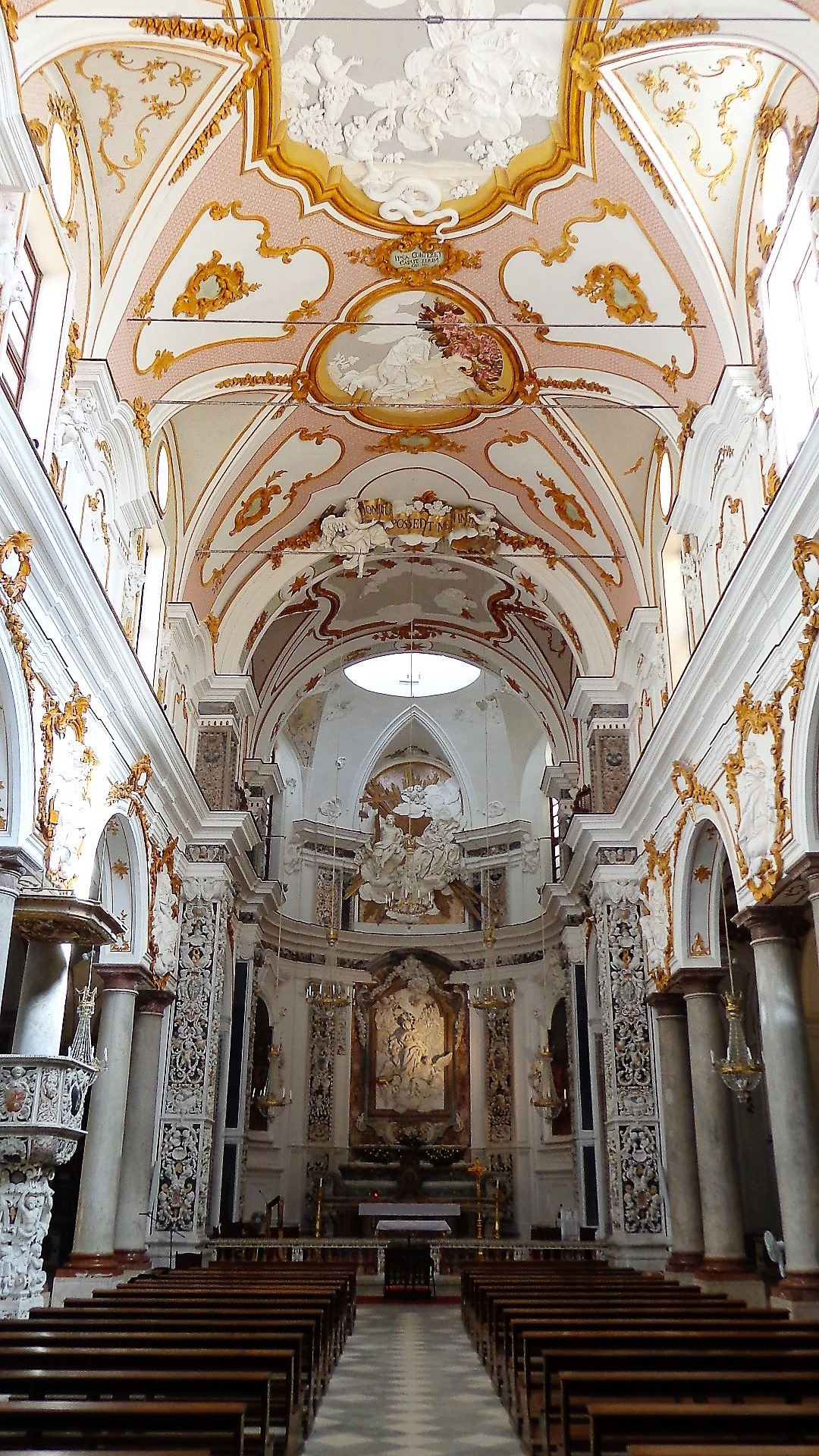 Navata